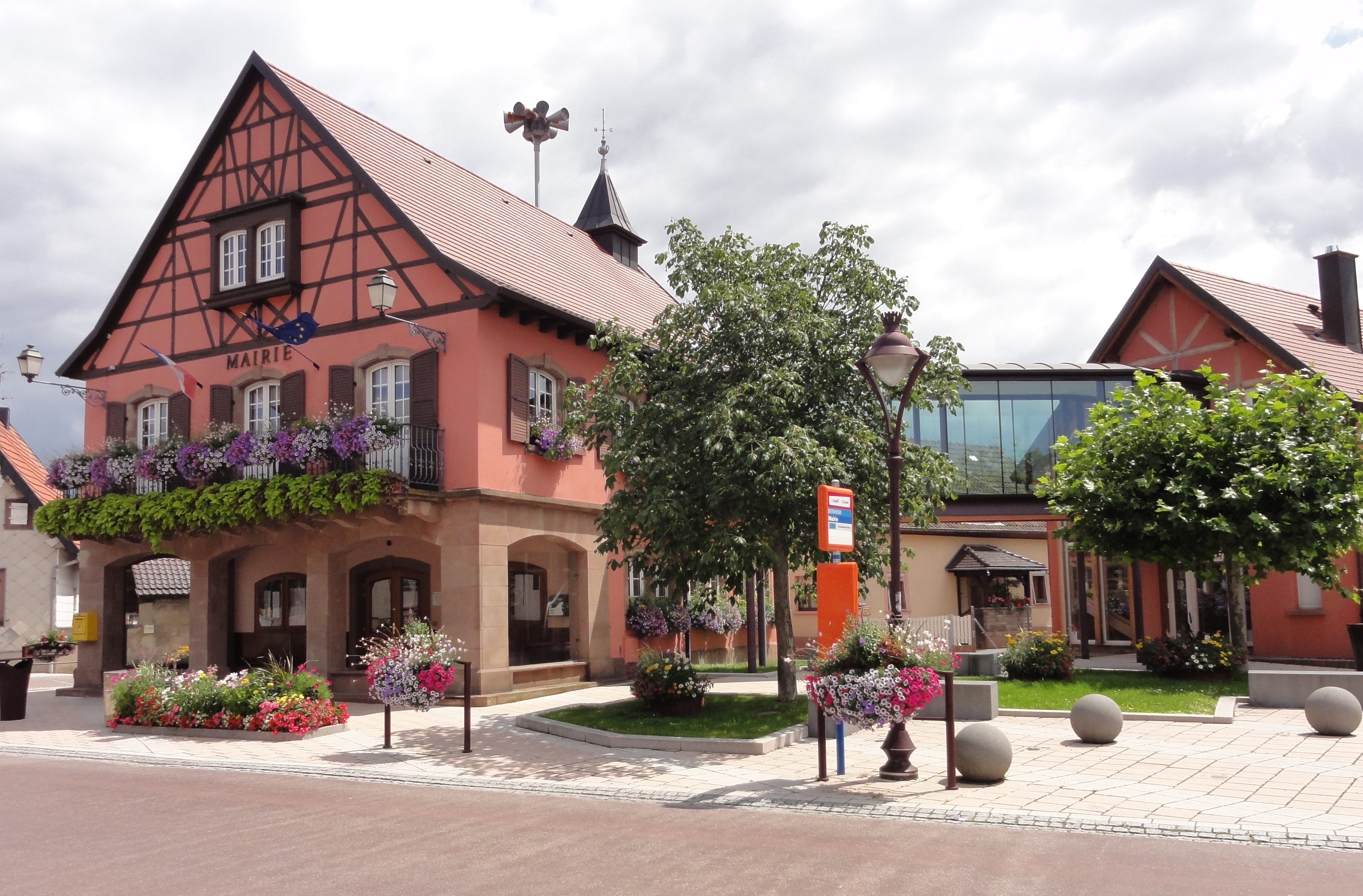 Alsace, Bas-Rhin, Beinheim, Mairie.